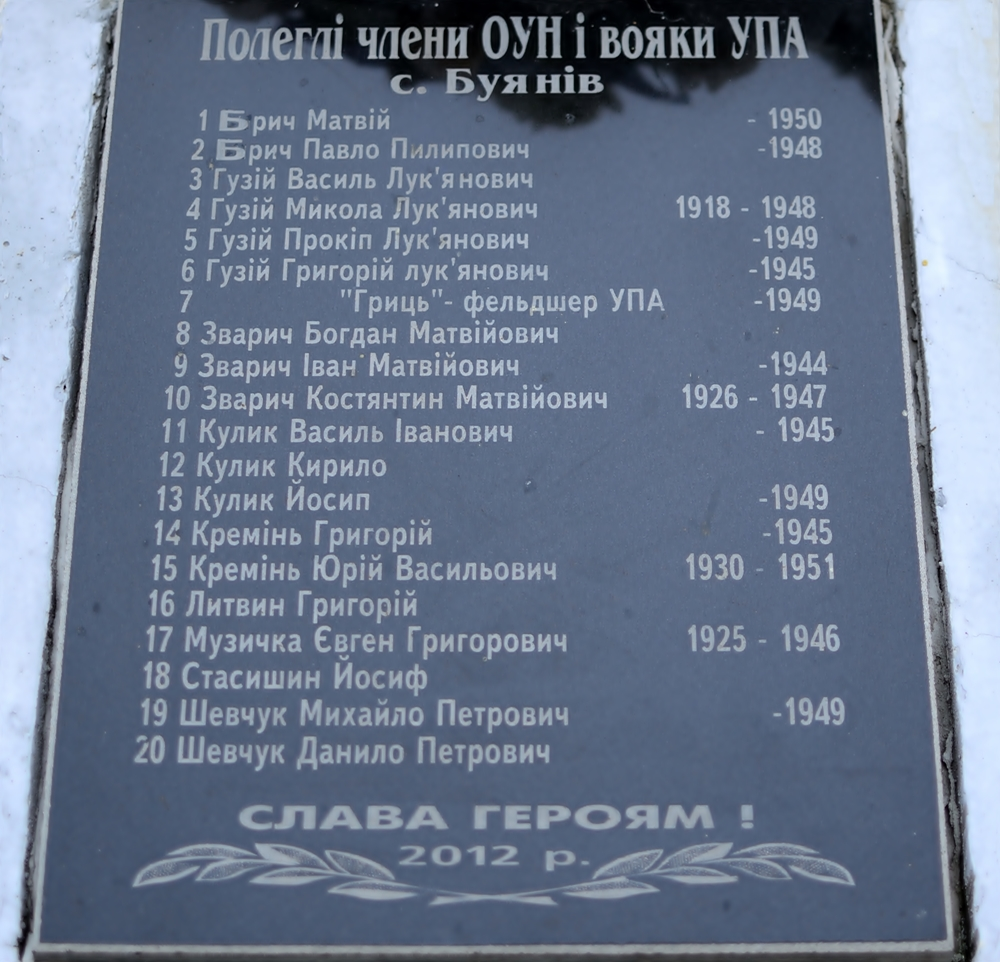 Полеглі члени ОУН і вояки УПА с.Буянів